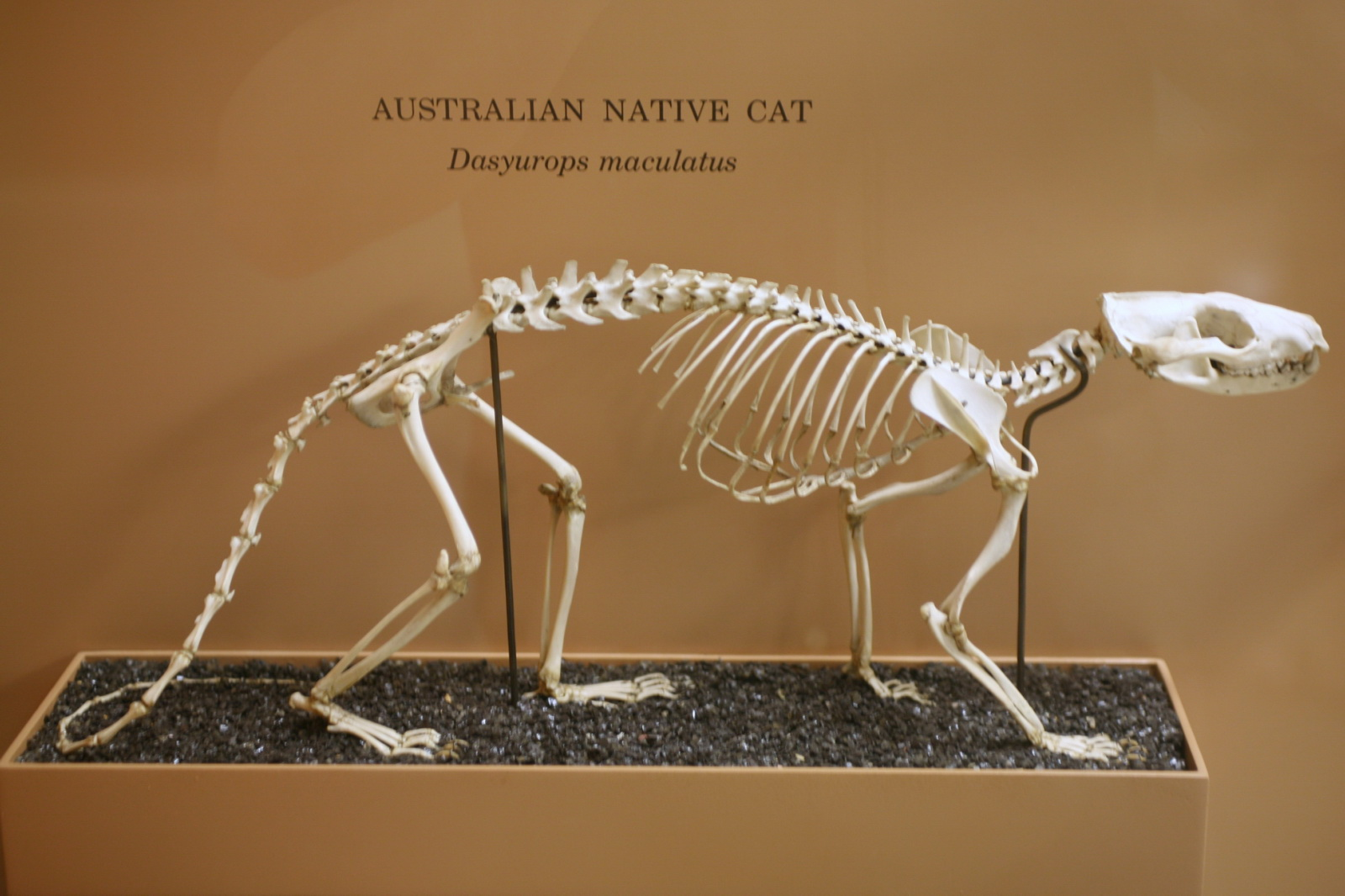 Dasyurus maculatus skeleton